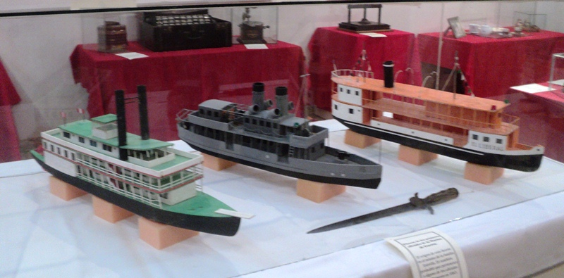 Maqueta de primeros barcos llegados a Iquitos.